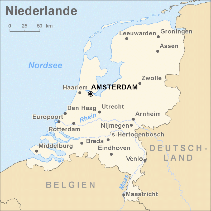 Karte der Niederlande